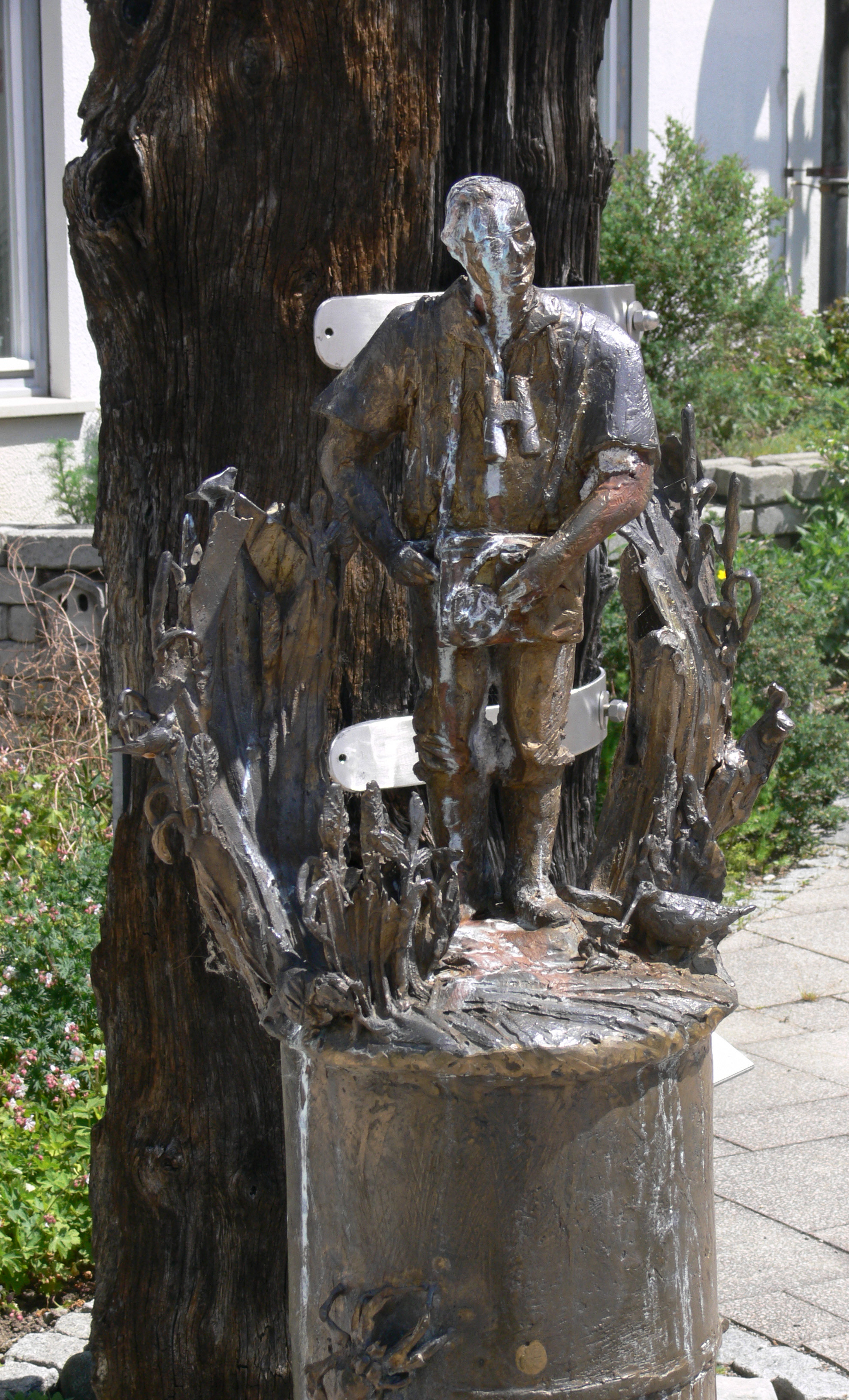 Bad Wurzach, Landkreis Ravensburg, Baden-Württemberg Statue des „Vogelpaters“ Agnellus Schneider vor dem Naturschutzzentrum